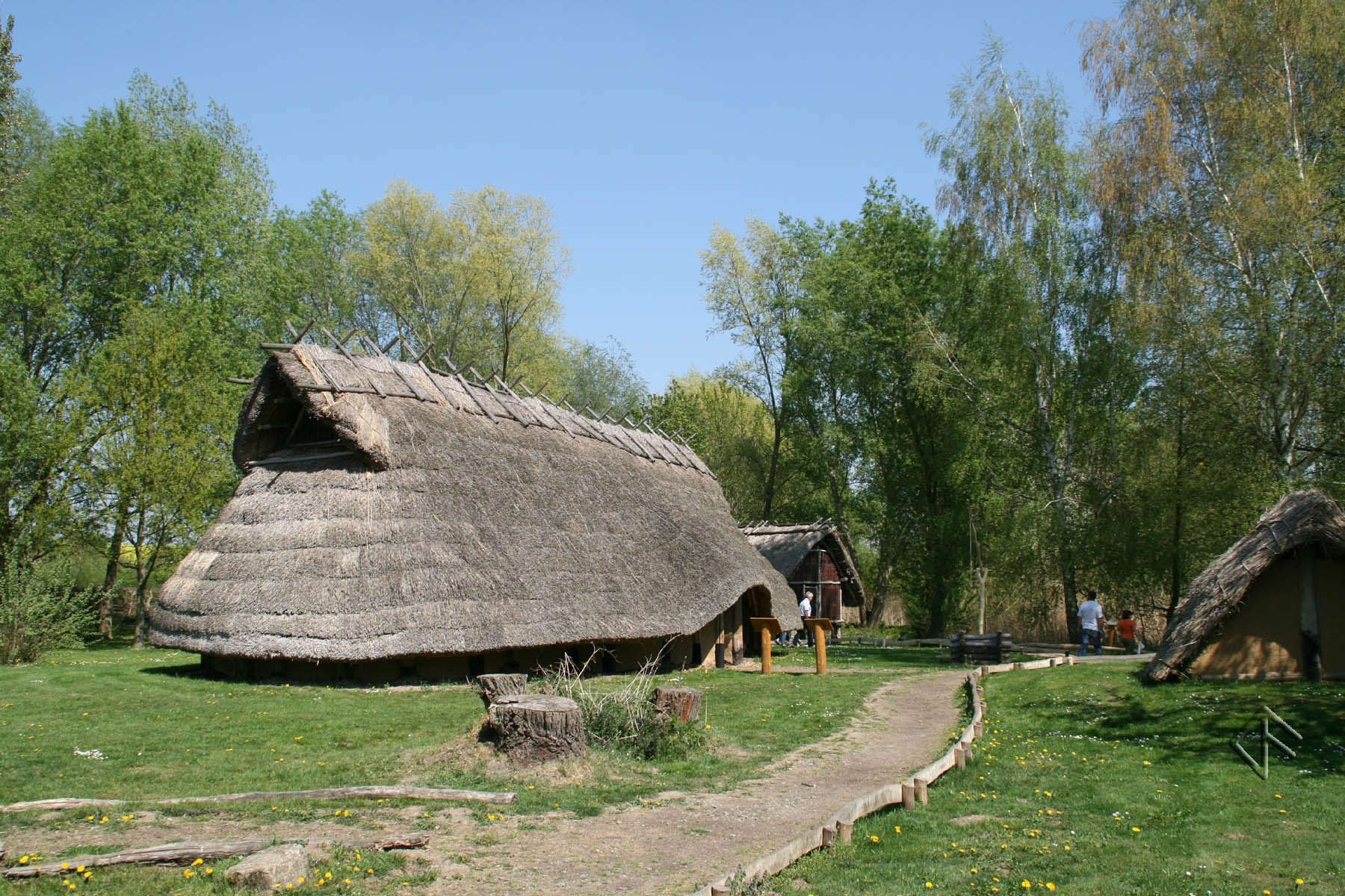 Germanische Siedlung 3. Jahrhundert nach Christus